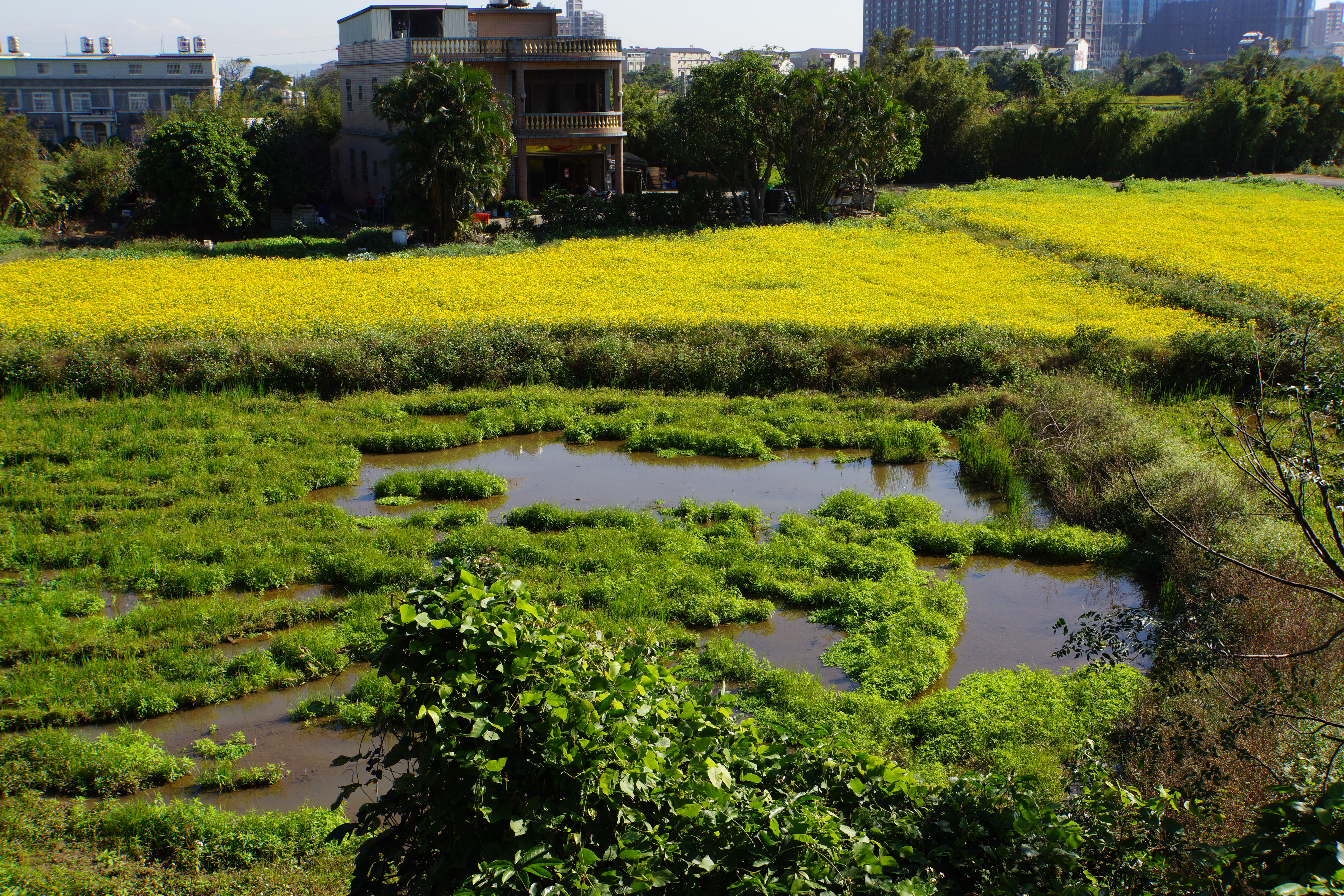 Qiaixi 洽溪